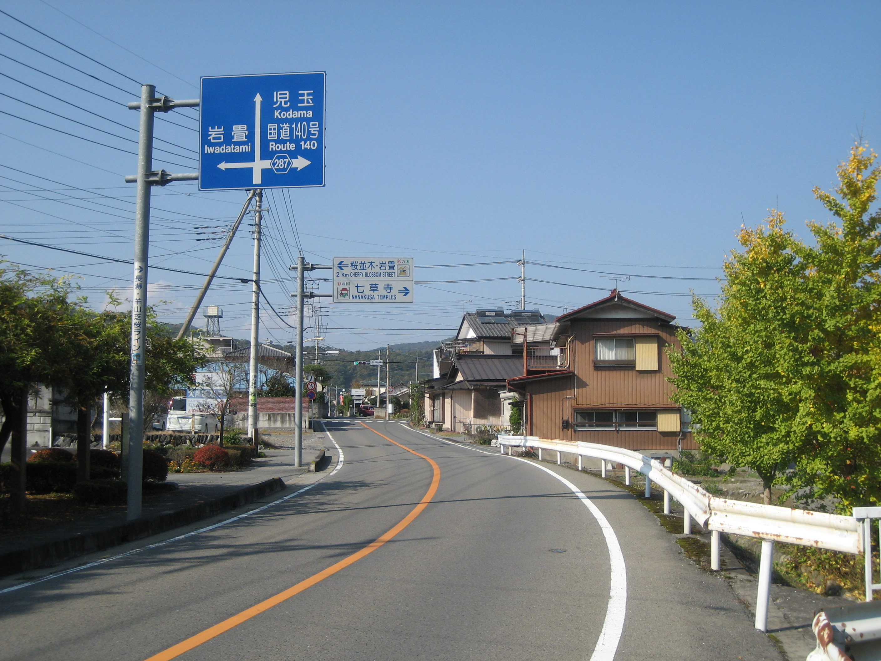 埼玉県道287号線長瀞町内